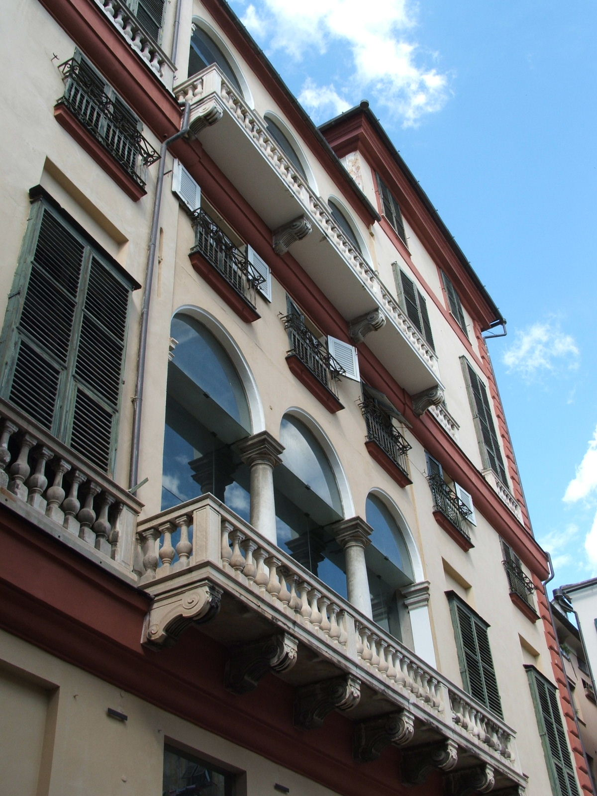 Genova, Via Garibaldi Palazzo Rosso - cortile